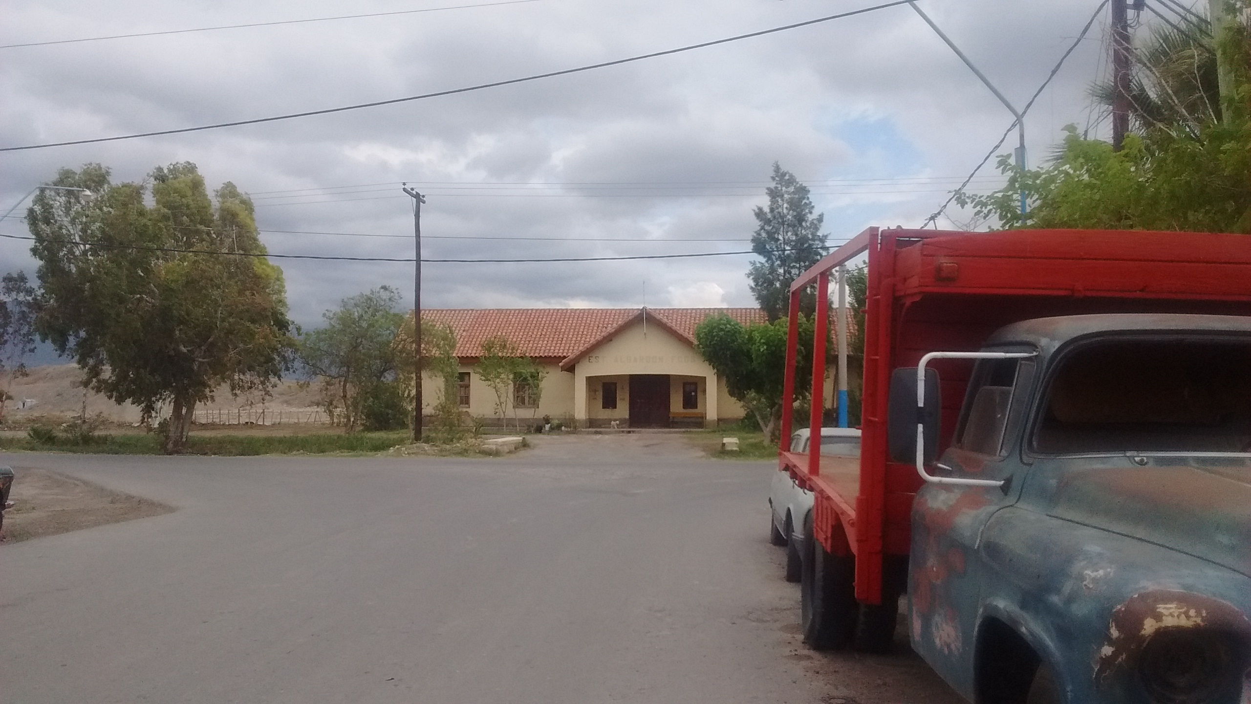 Estación Albardón (FCGB) vista desde su frente.